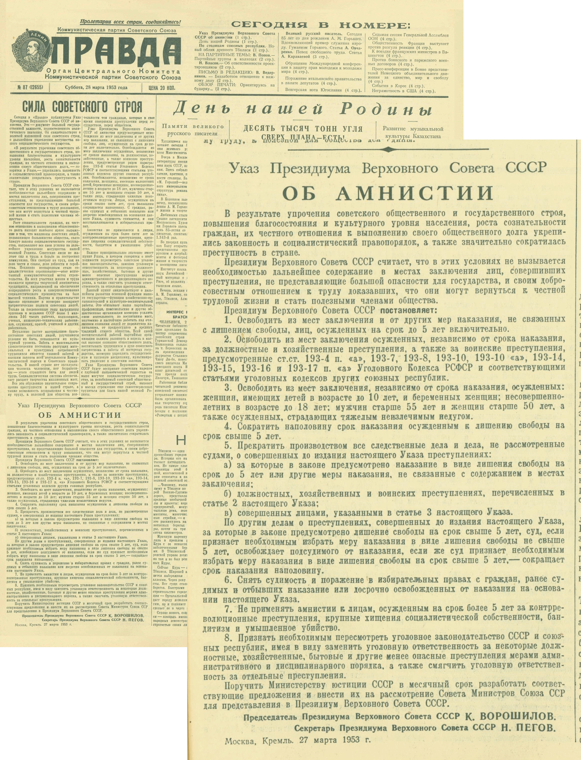 Правда. 1953. 28 марта. Первая полоса. Указ об амнистии